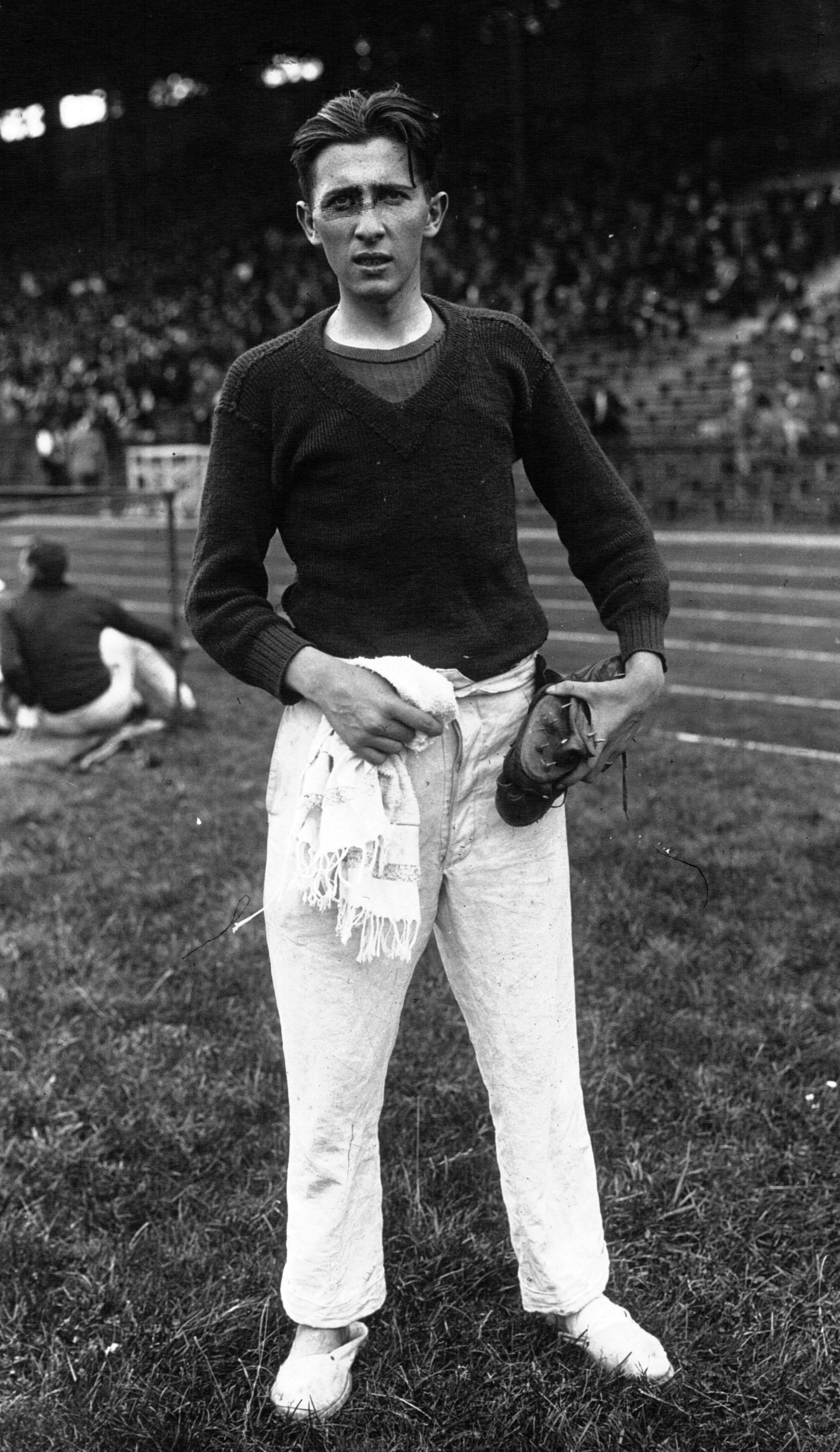 Colombes : championnats de France d'Athlétisme : Ménard, (portrait) gagnant du saut en hauteur.